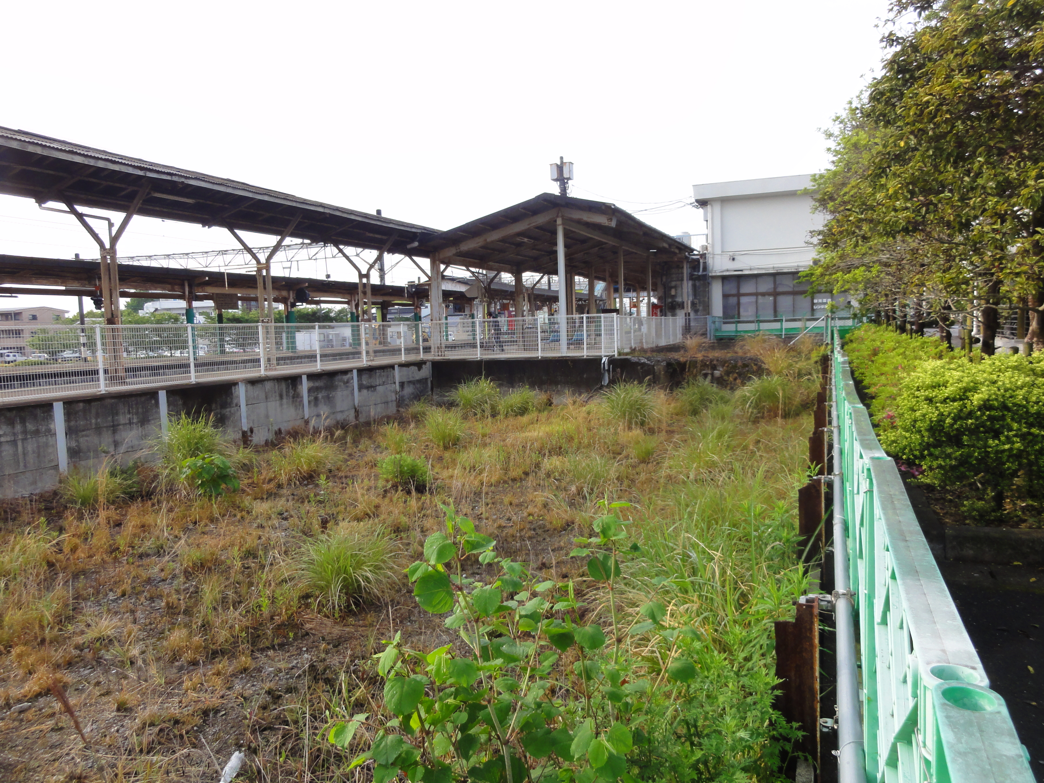 高千穂鉄道延岡駅ホーム跡地